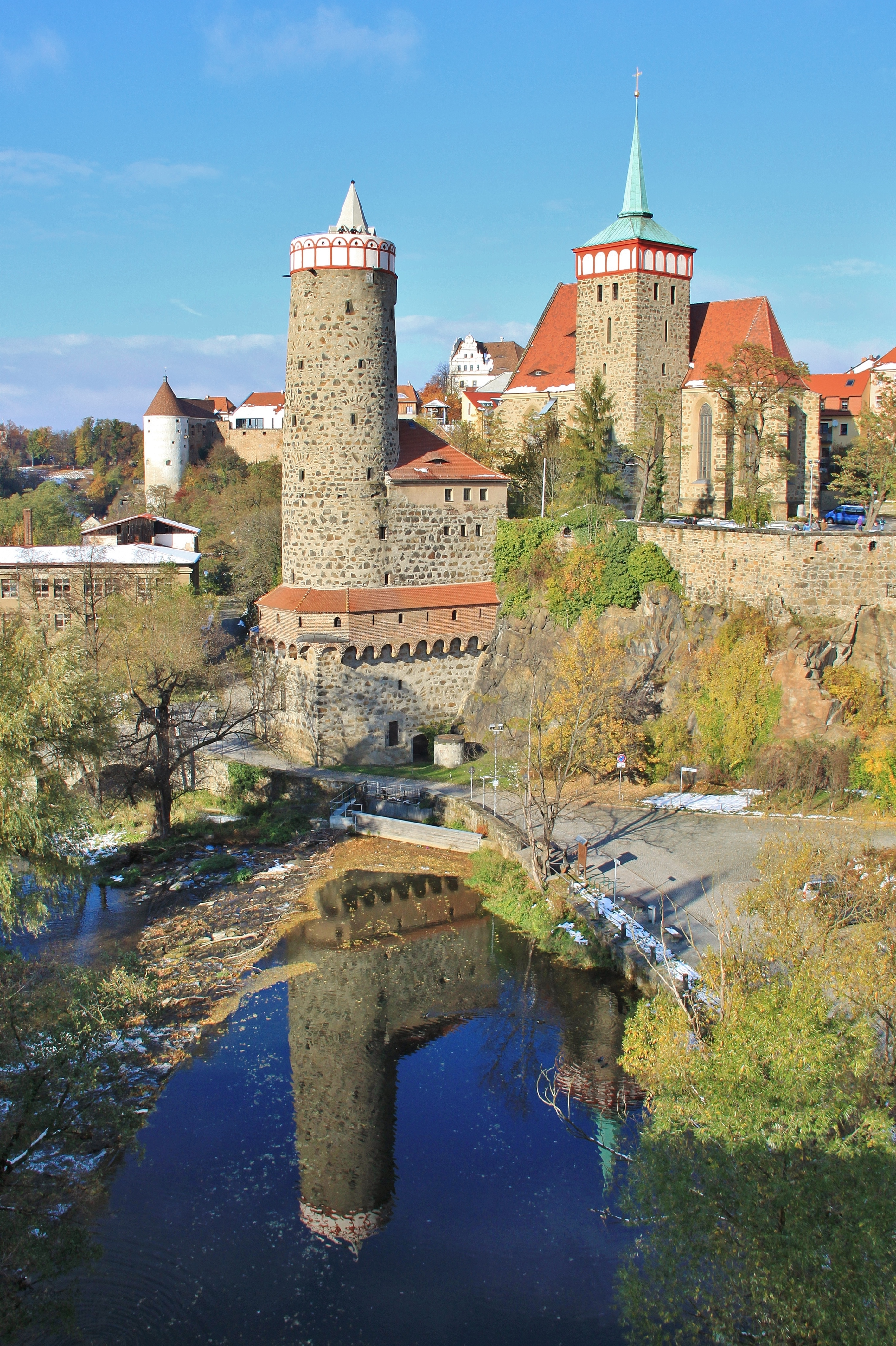 Bautzen, Michaeliskirche und Alte Wasserkunst